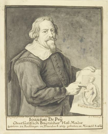 Bildnis des Ioannes de Pey Georg Christoph Kilian - Nürnberg, Germanisches Nationalmuseum, Graphische Sammlung, Inv.-Nr. MP 18212